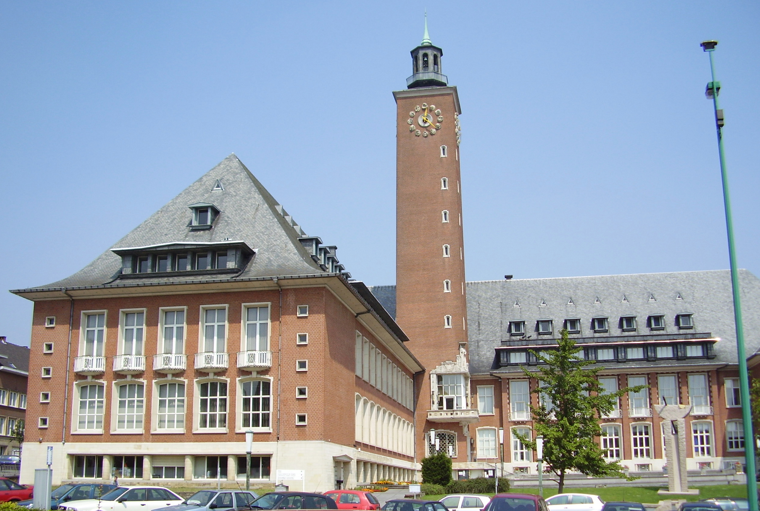 Maison communale de Woluwe-Saint-Pierre (Bruxelles)